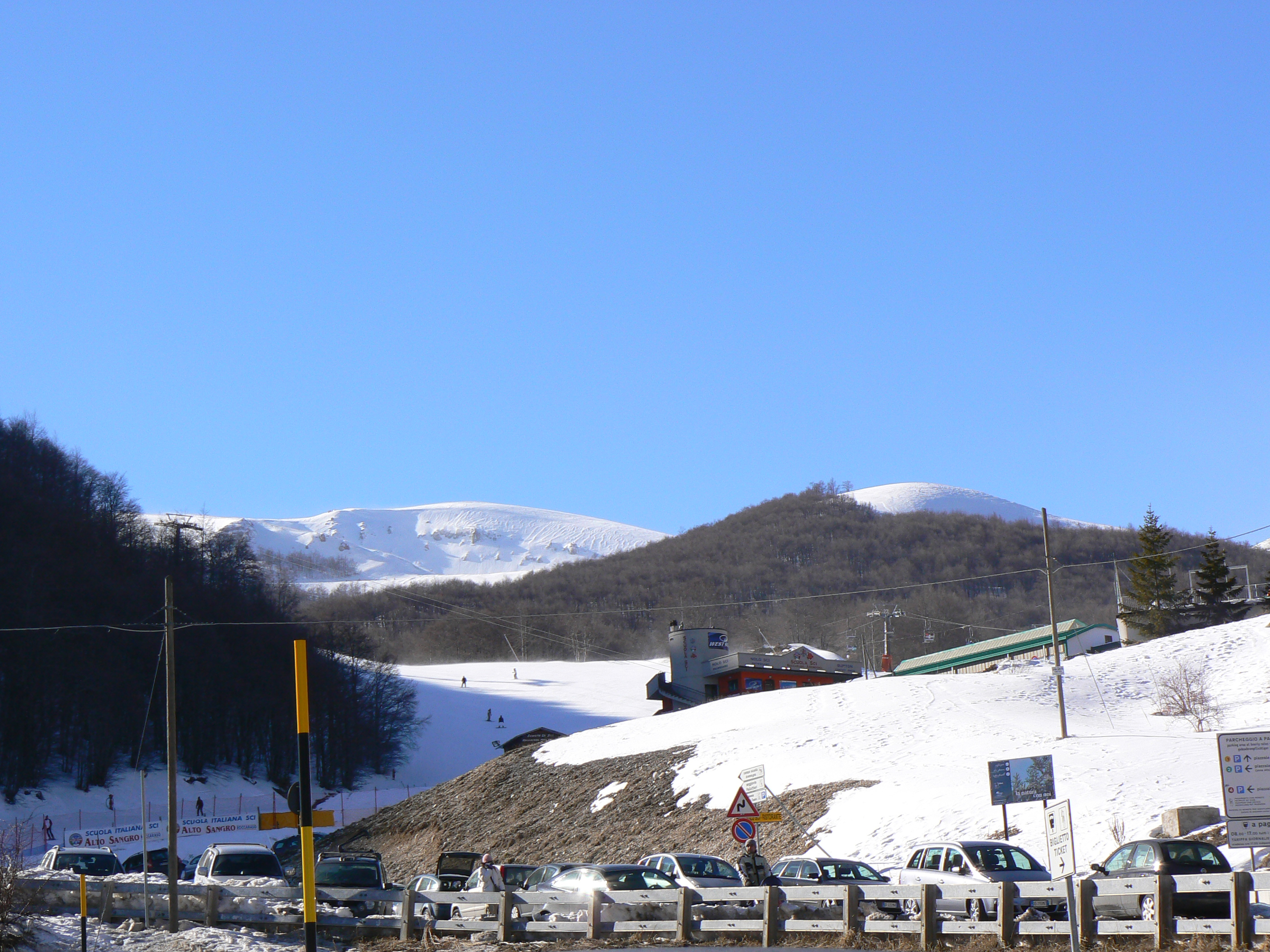 67037 Aremogna AQ, Italy